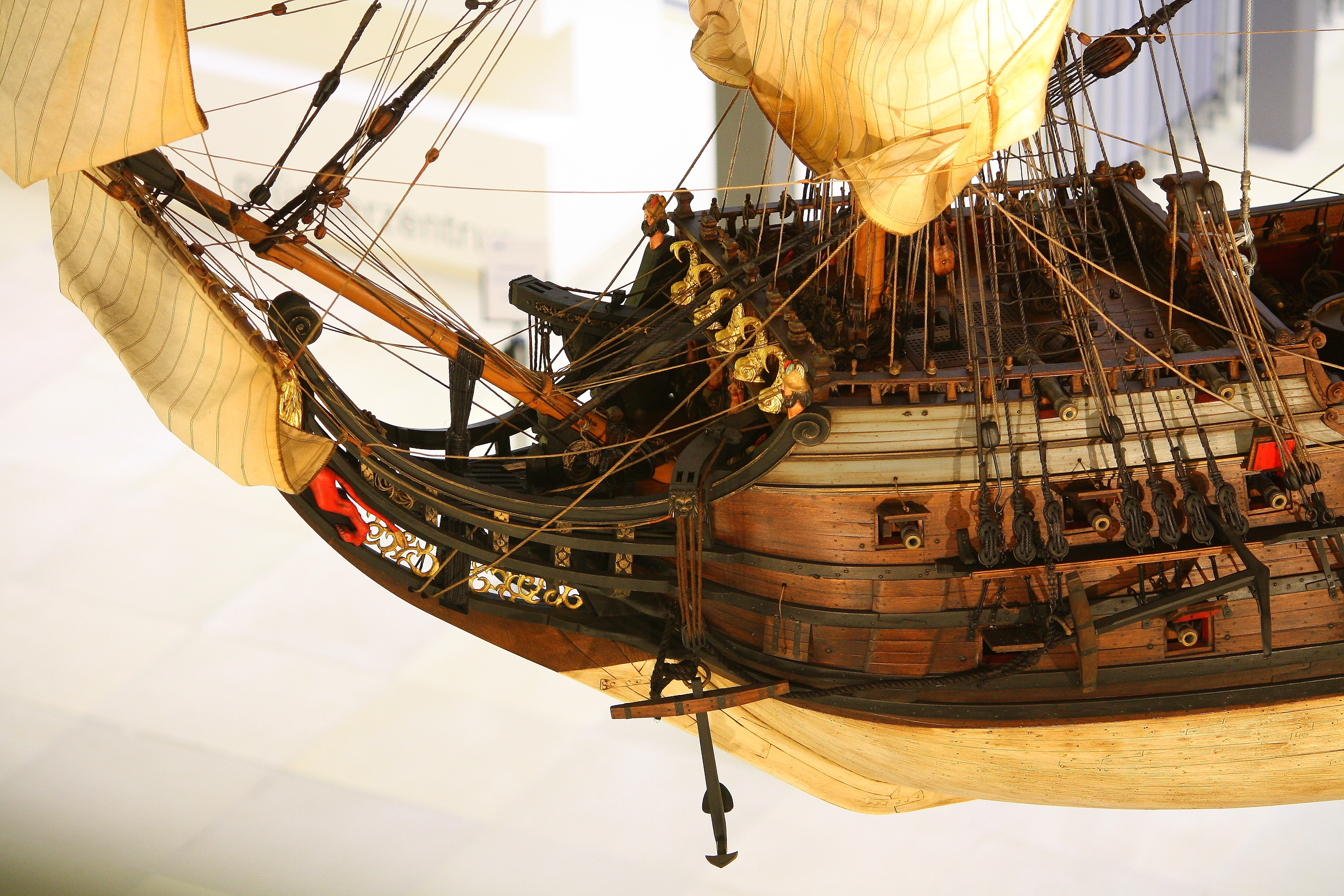 Modell des hamburgischen Konvoyschiffes Leopoldus Primus - Detailansicht Vorschiff (Backbordseite)